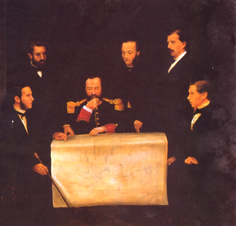 El general Mariano Ignacio Prado y su primer gabinete, al asumir la dictadura en el Perú en noviembre de 1865. De izquierda a derecha, parados: José Gálvez Egúsquiza, José María Químper, Manuel Pardo y Lavalle. Sentados: José Simeón Tejeda, M. I. Prado y Toribio Pacheco y Rivero.